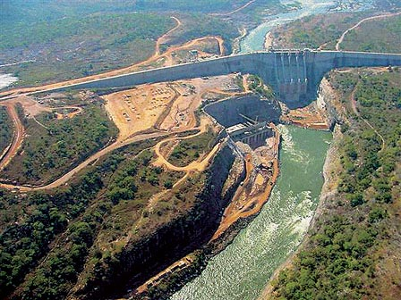 ГЭС "КАПАНДА"